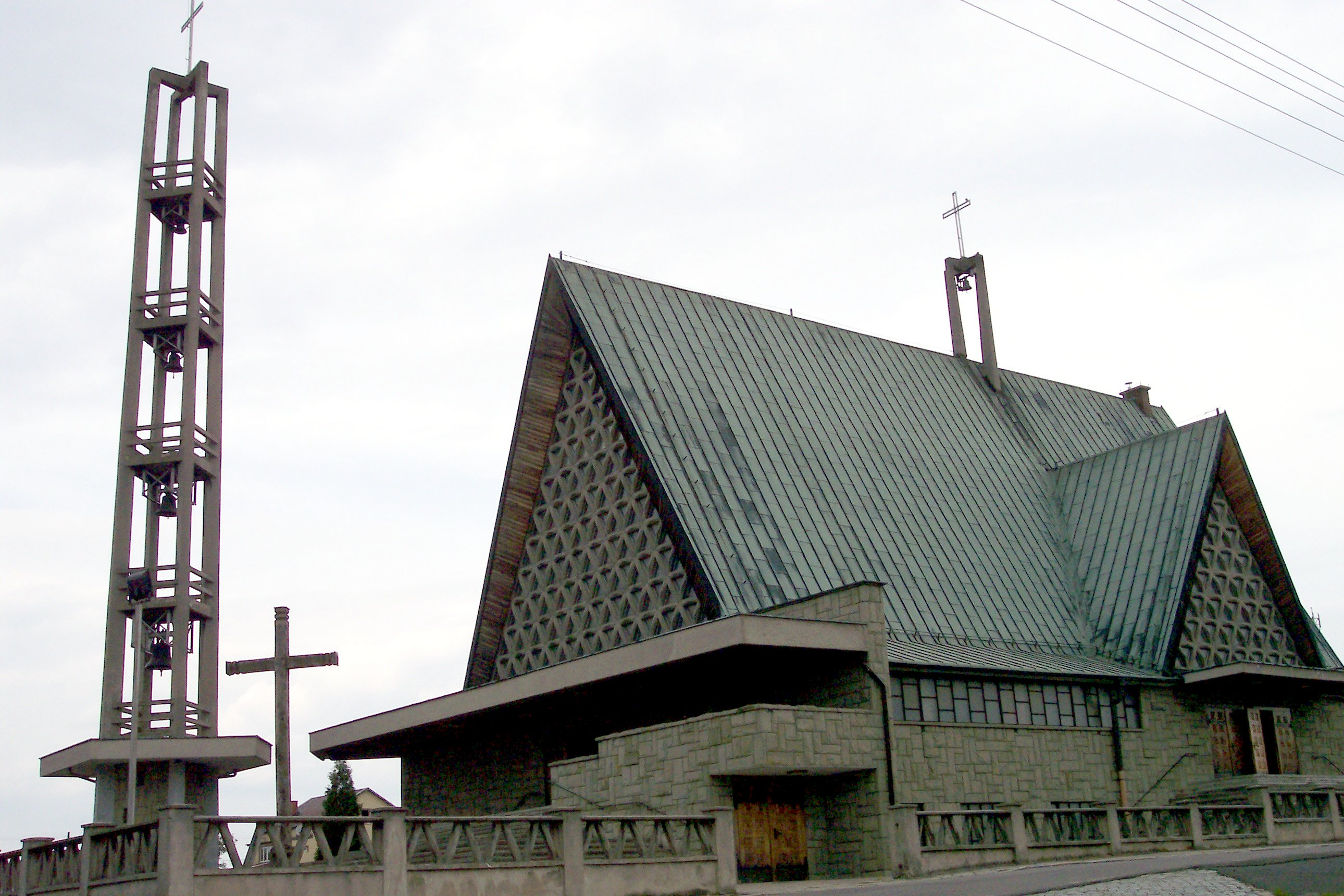 Kościół Nawiedzenia NMP w Bojszowie